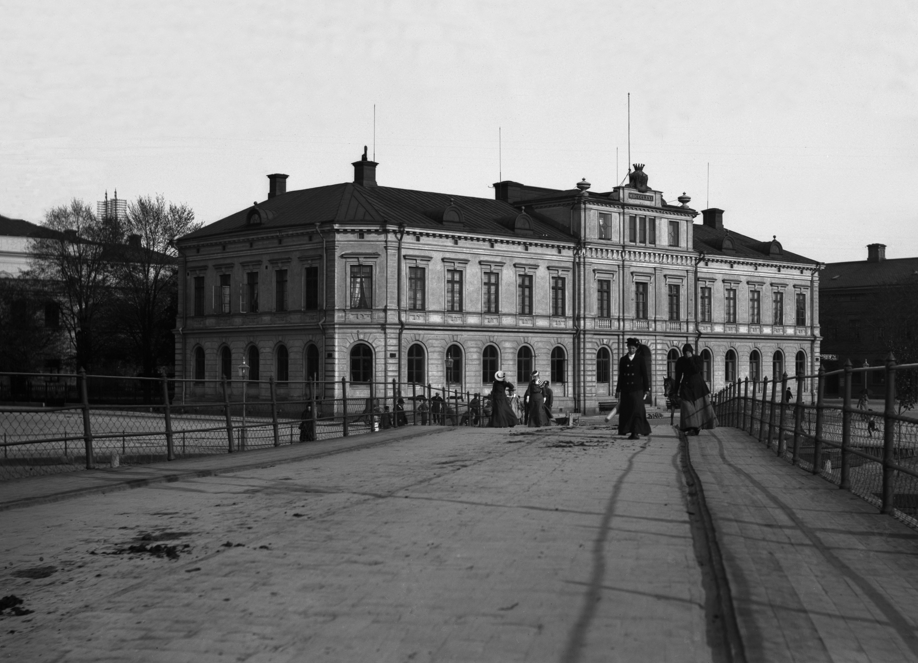 Residenset i Karlstad kring sekelskiftet 1900